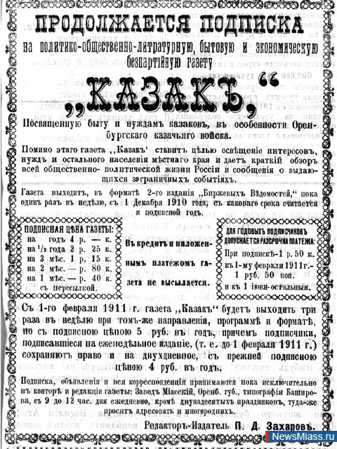 Кузнецов Корнилий Тимофеевич